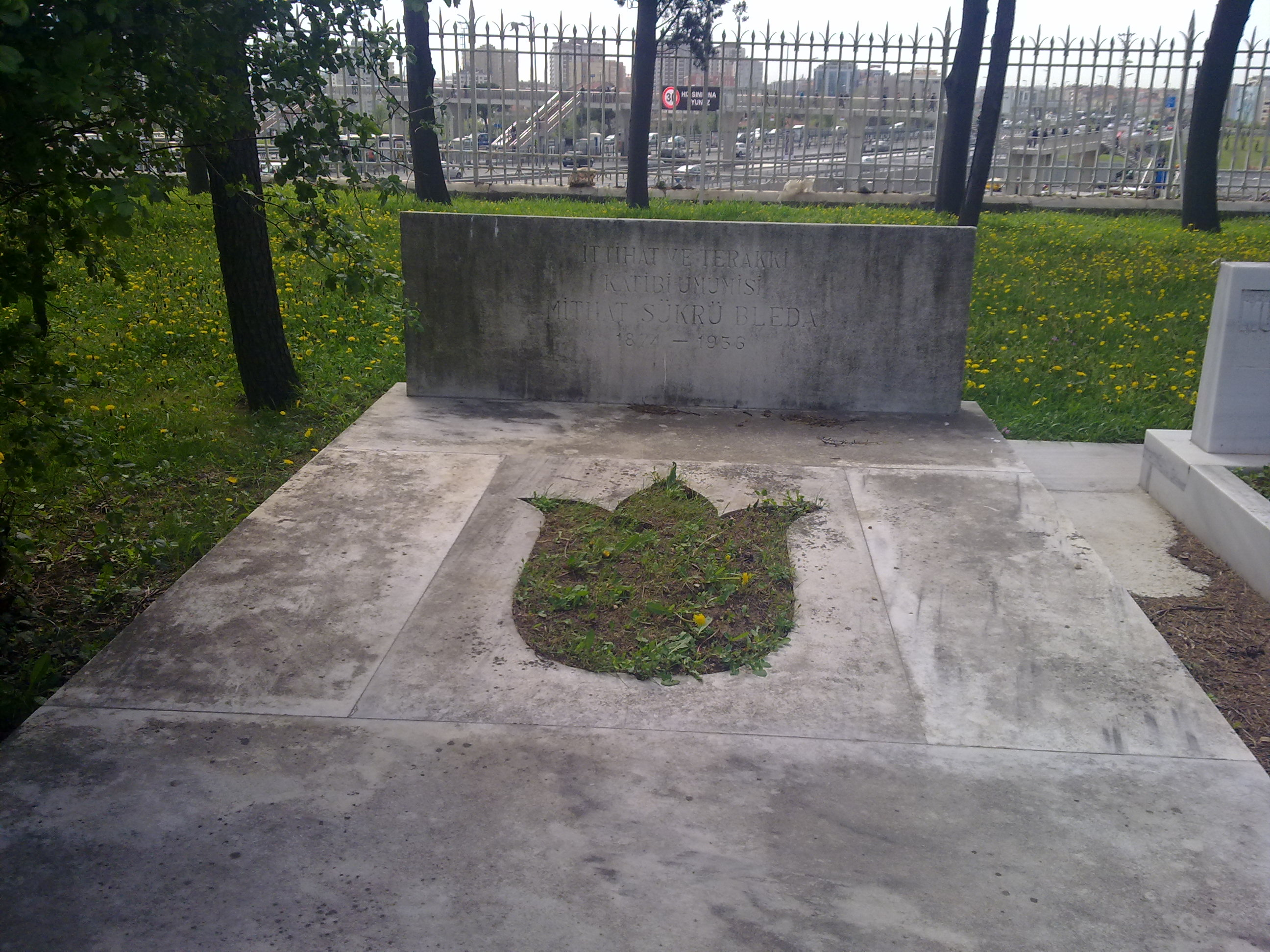 Mithat Şükrü Bleda'nın Abide-i Hürriyet'te bulunan kabri.